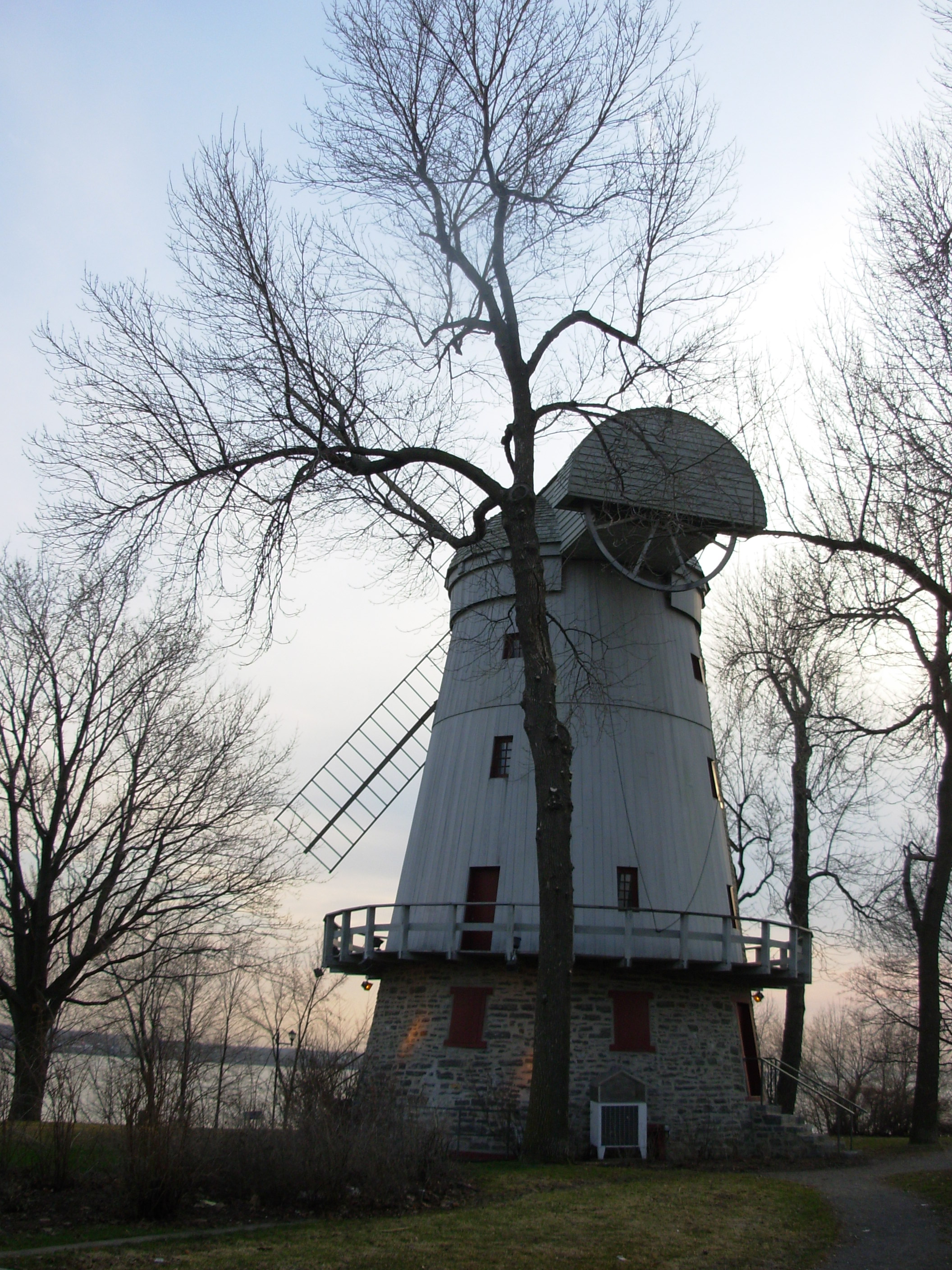 Moulin fleming